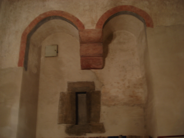 okno wykuszowe kuchenne w zamku w Szydłowcu